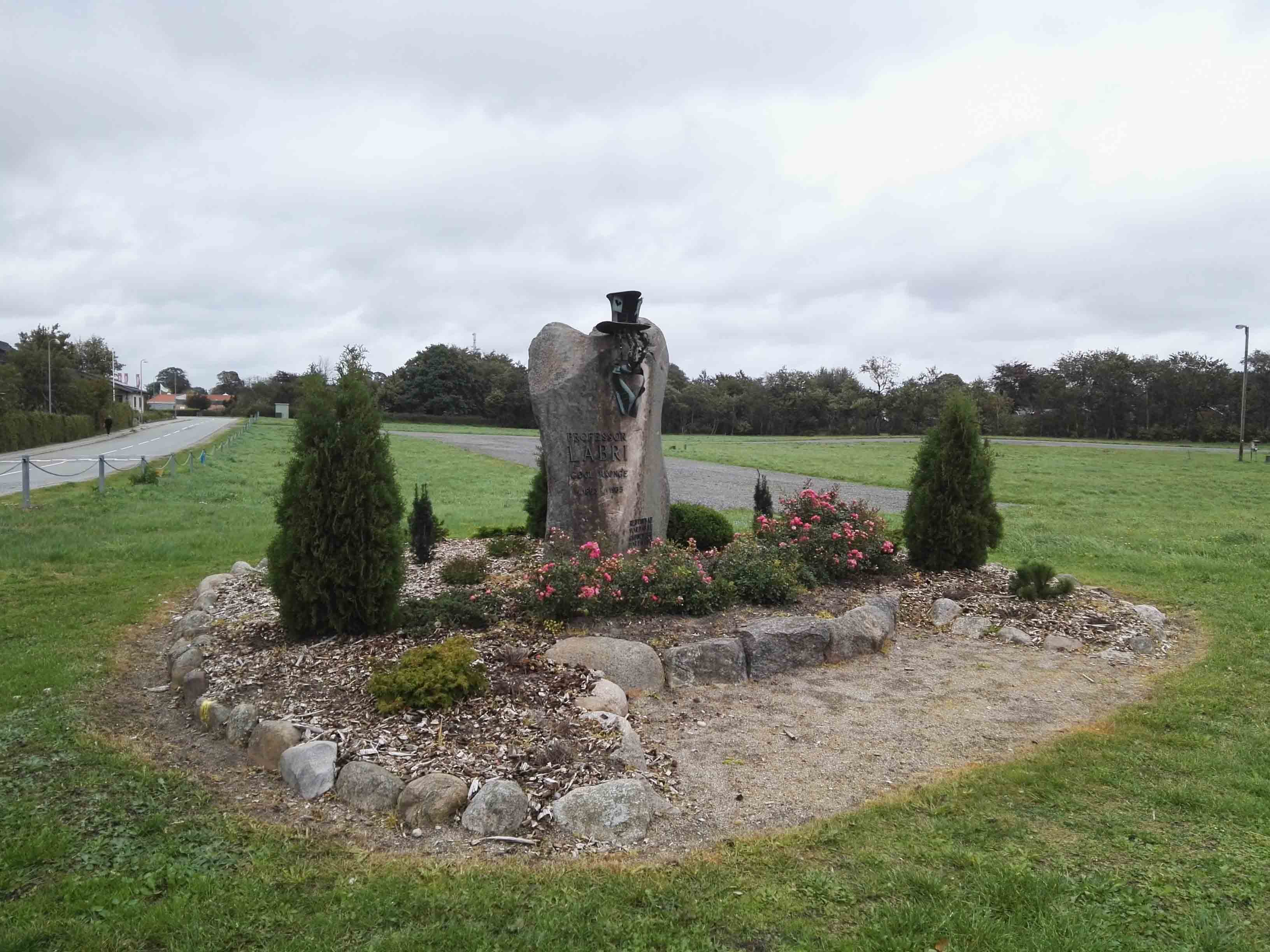 Mindesten for Professor Labri ved markedspladsen i Vorbasse